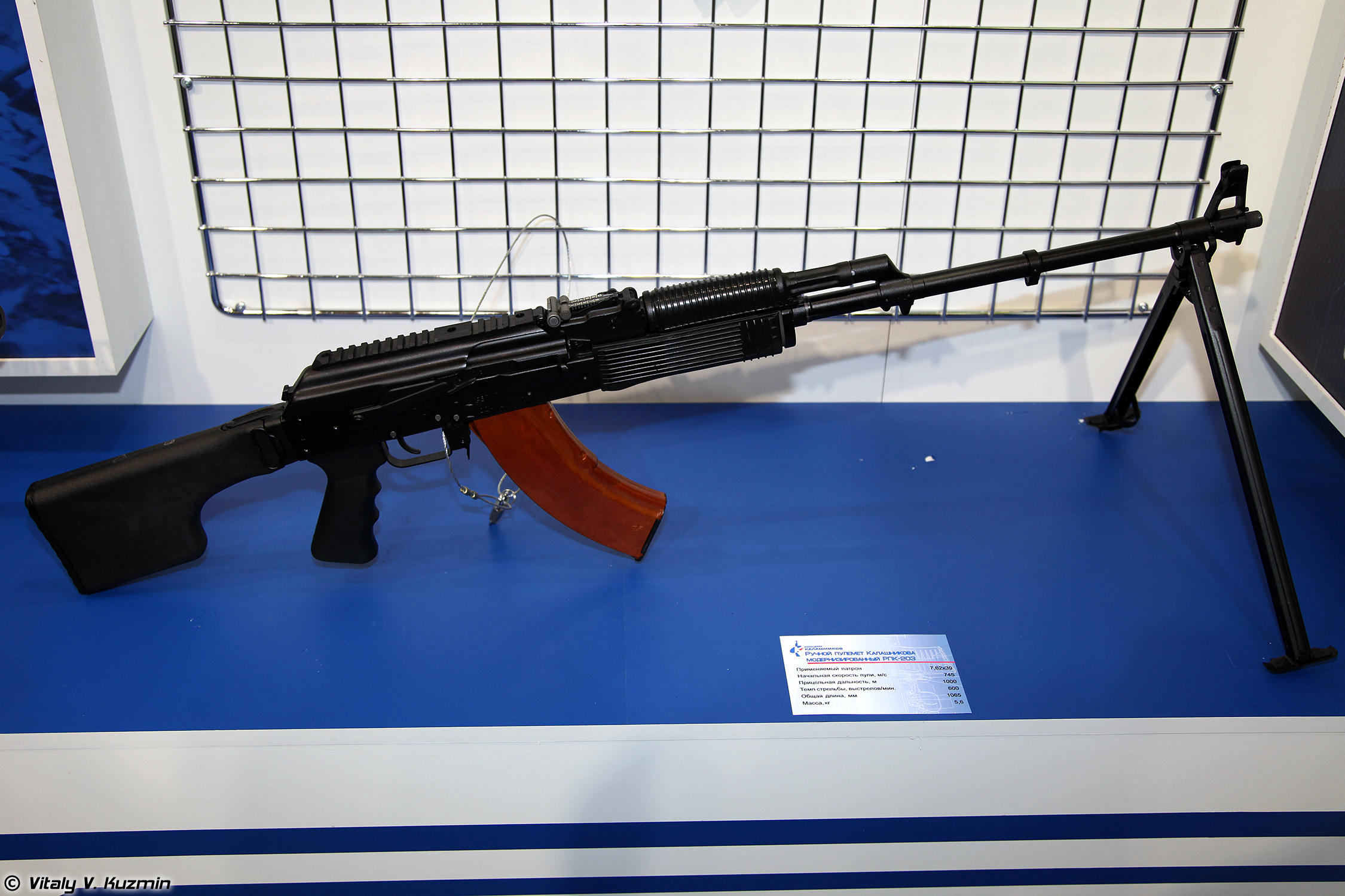 РПК-203 (RPK-203 machine gun)